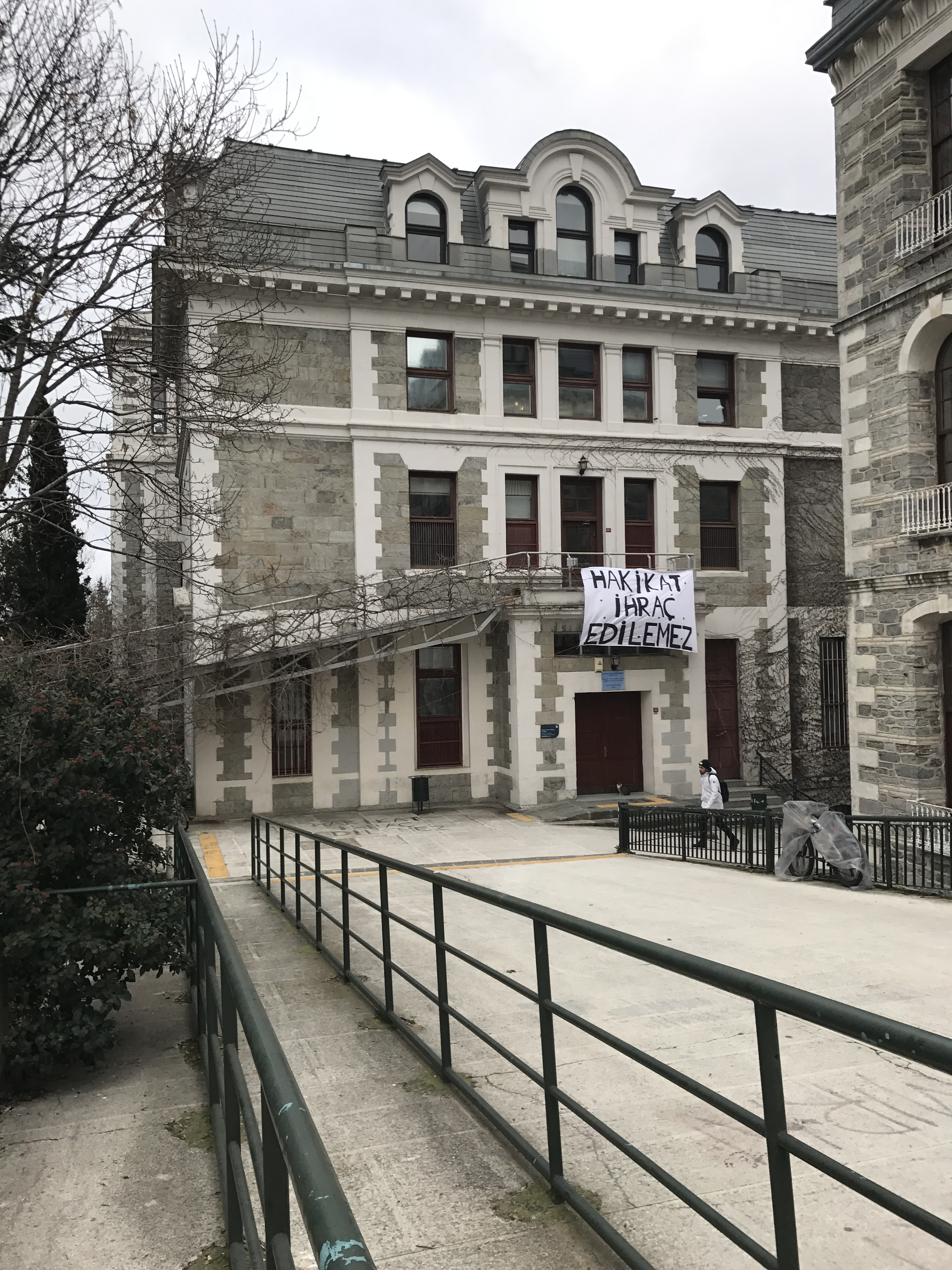 Boğaziçi Üniversitesi Siyasal Bilimler Fakültesi binası. Binanın üzerinde akademisyen ihraçlarını protesto eden bir afiş var.